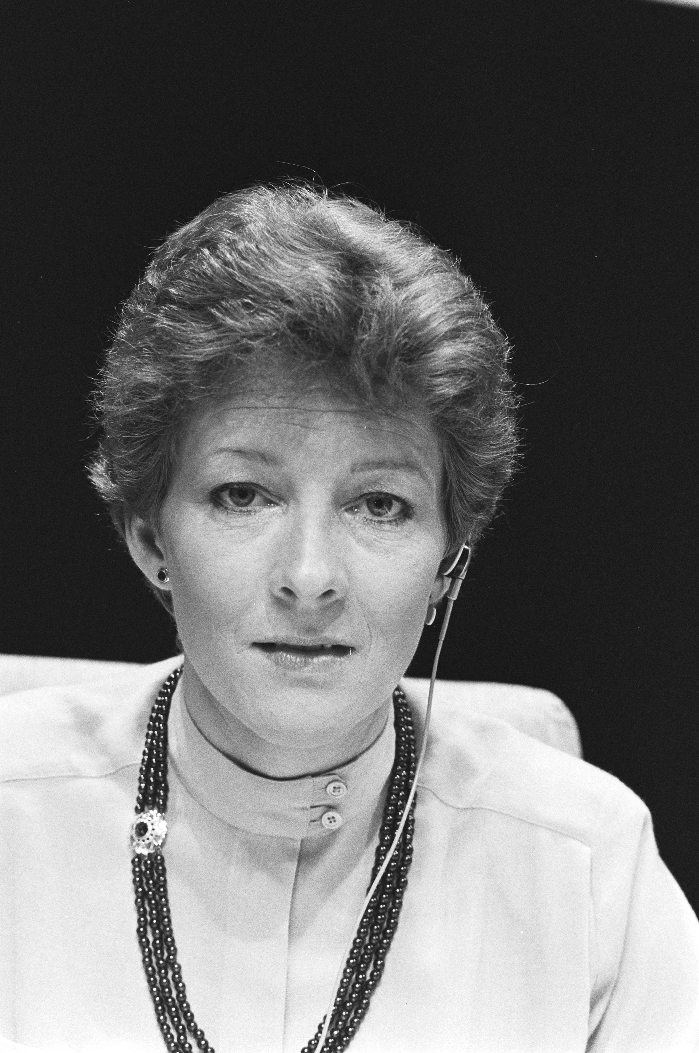 Collectie / Archief : Fotocollectie Anefo Reportage / Serie : [ onbekend ] Beschrijving : Provinciale Staten verkiezingen. TV-programma over uitslag. 8.9 Noortje van Oostveen (NOS), 10.11 Rien Huizinga (NOS) Datum : 25 maart 1982 Trefwoorden : VERKIEZINGEN Instellingsnaam : NOS Fotograaf : Croes, Rob C. / Anefo Auteursrechthebbende : Nationaal Archief Materiaalsoort : Negatief (zwart/wit) Nummer archiefinventaris : bekijk toegang 2.24.01.05 Bestanddeelnummer : 932-0687